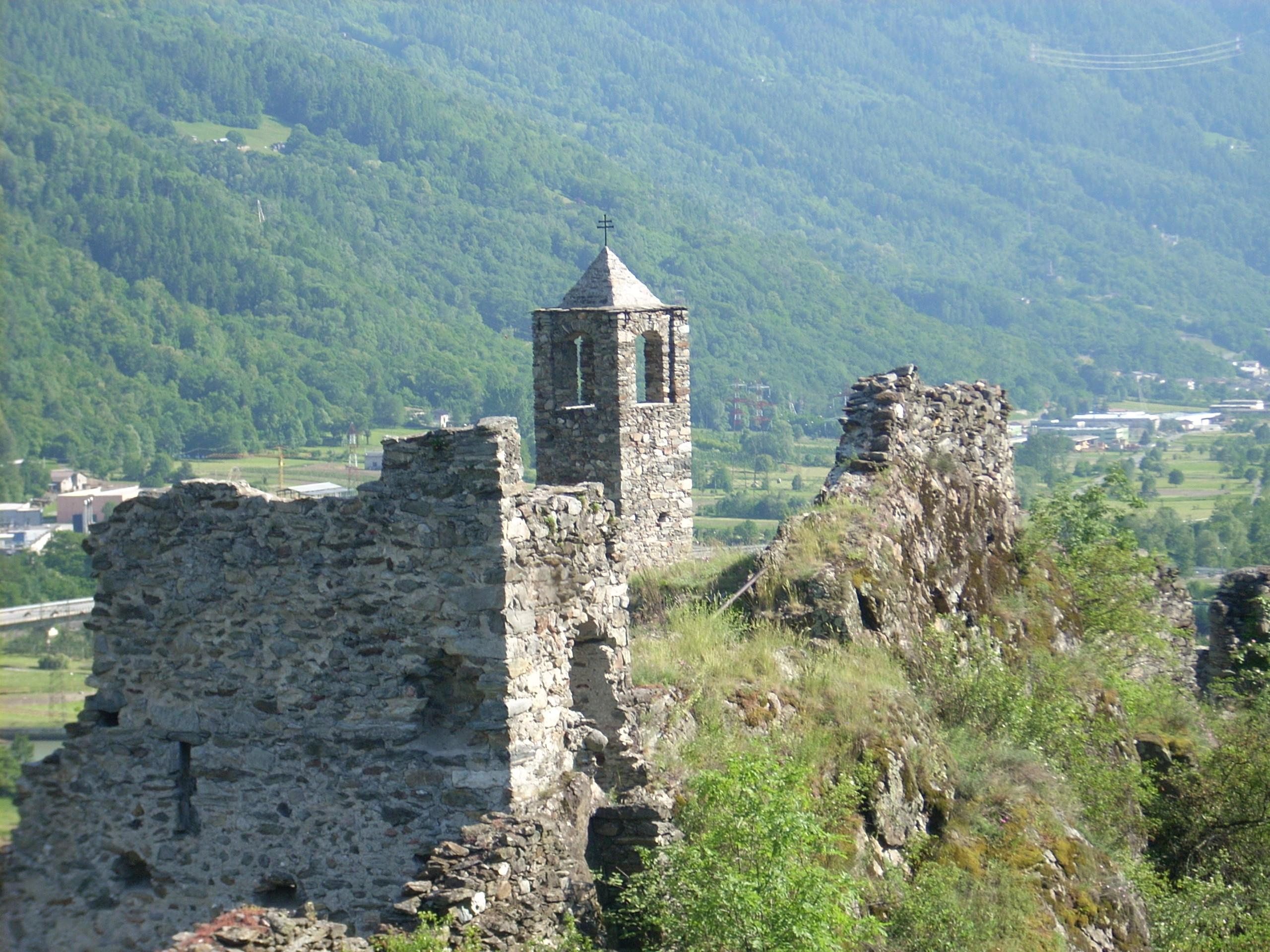 RUDERI DEL CASTELLO DI S.FAUSTINO